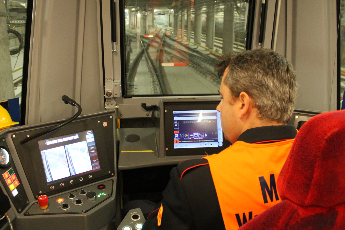 Zmiana kierunku na torach odstawczych zlokalizowanych za stacją C15 Dworzec Wileński.